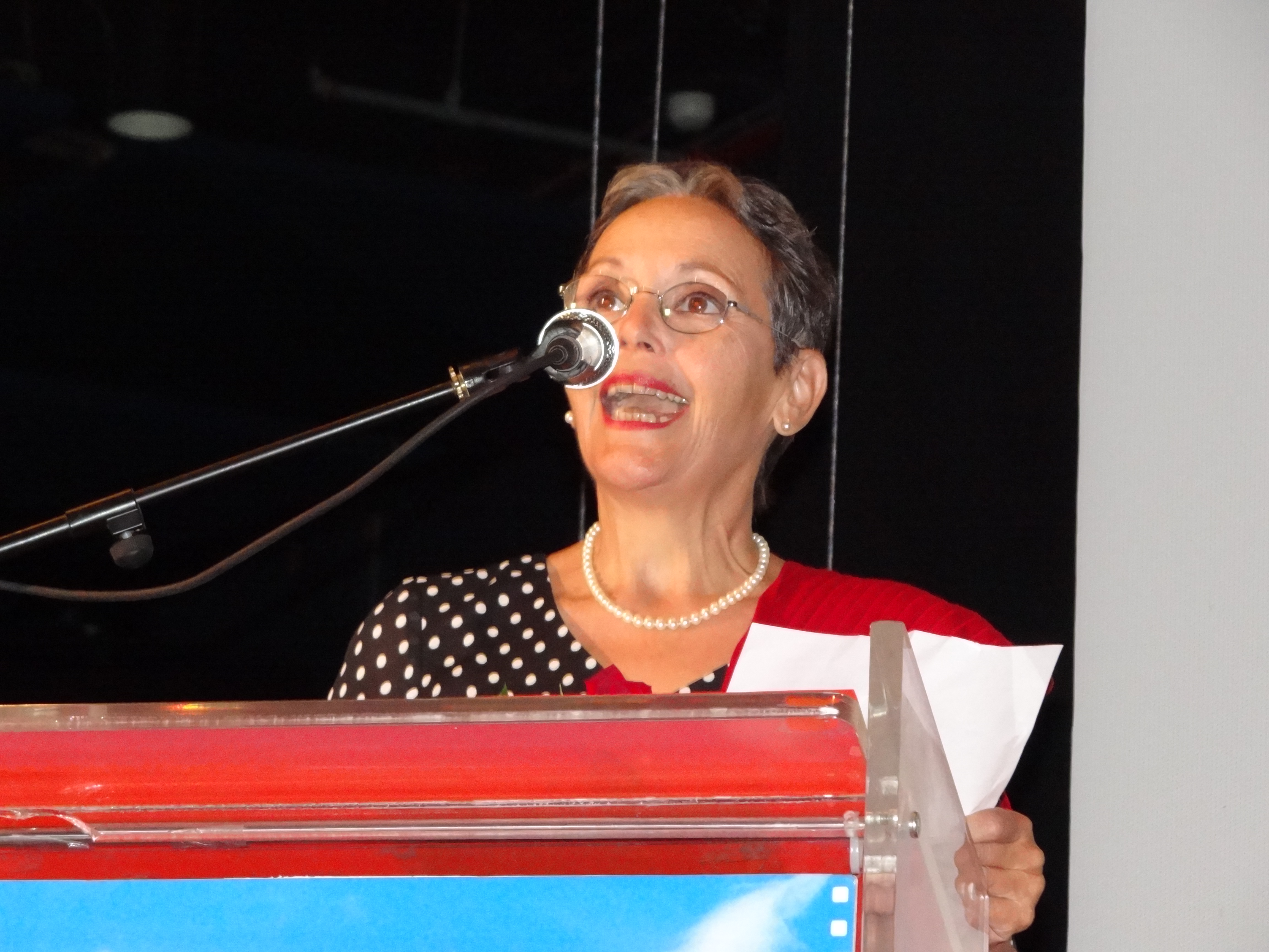 לבנה פינקלשטיין בפסטיבל הסרטים בחיפה